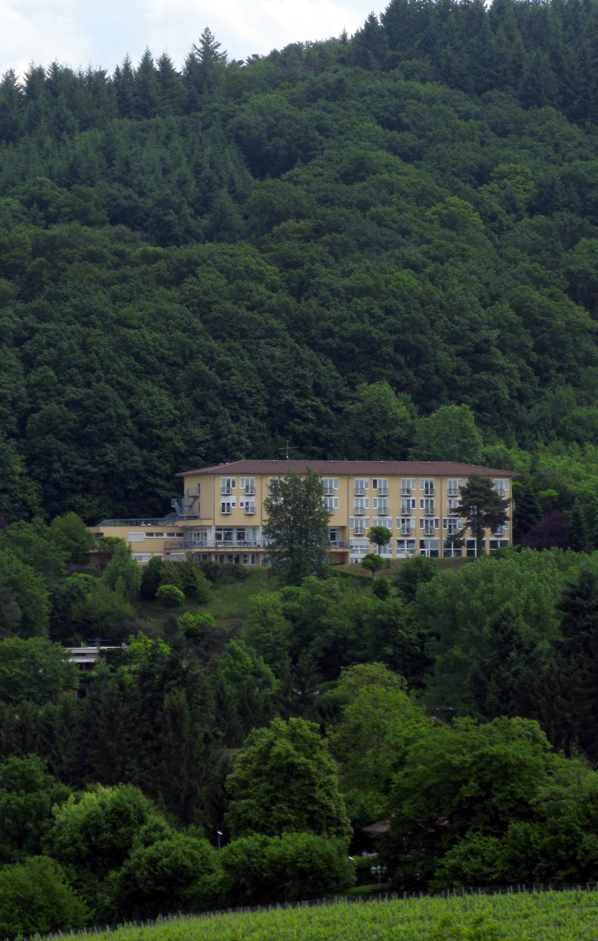 Pflegeheim Haus Erich-Fried in Staufen